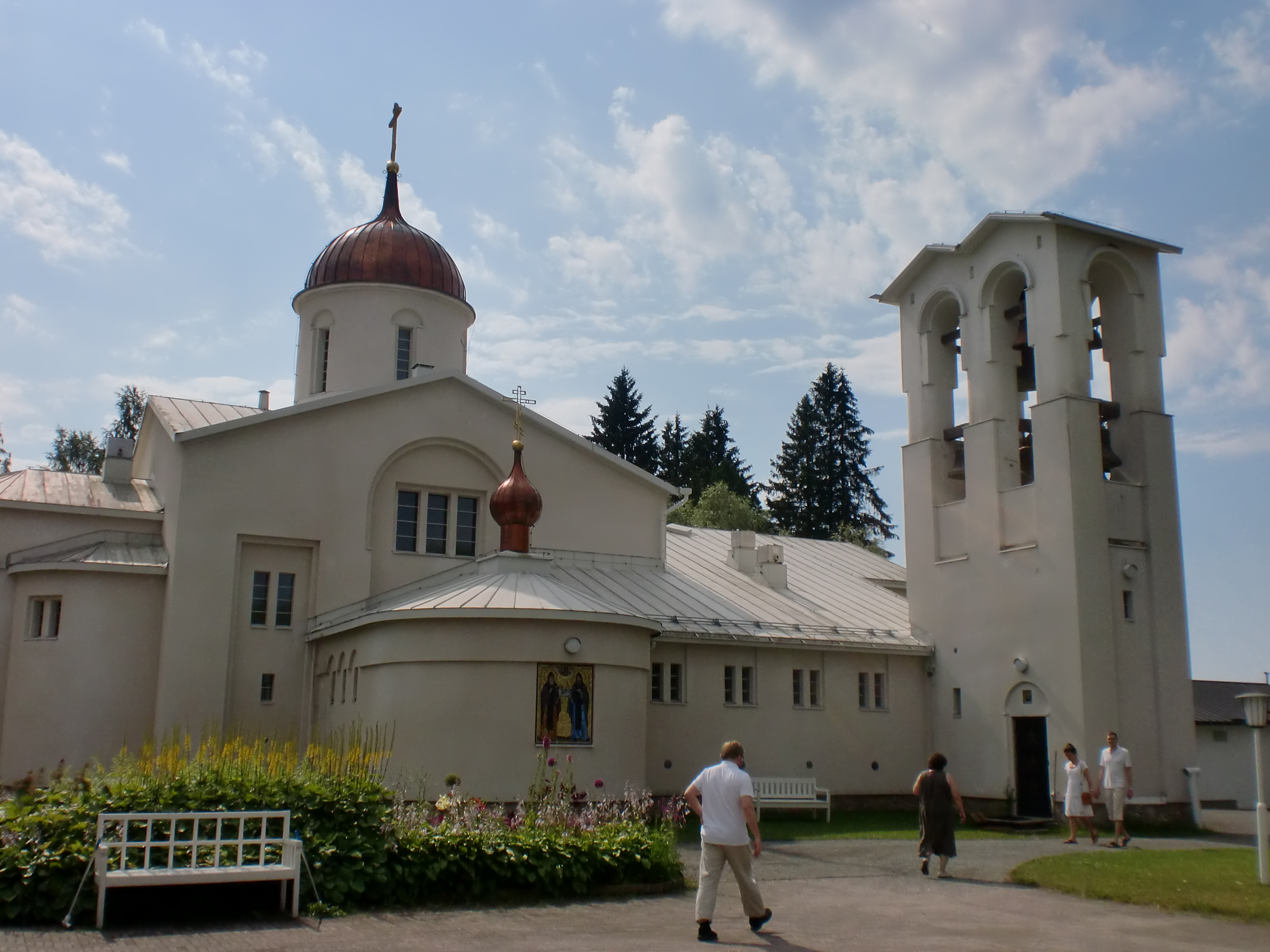 Valamon luostari; luostari Heinävedellä